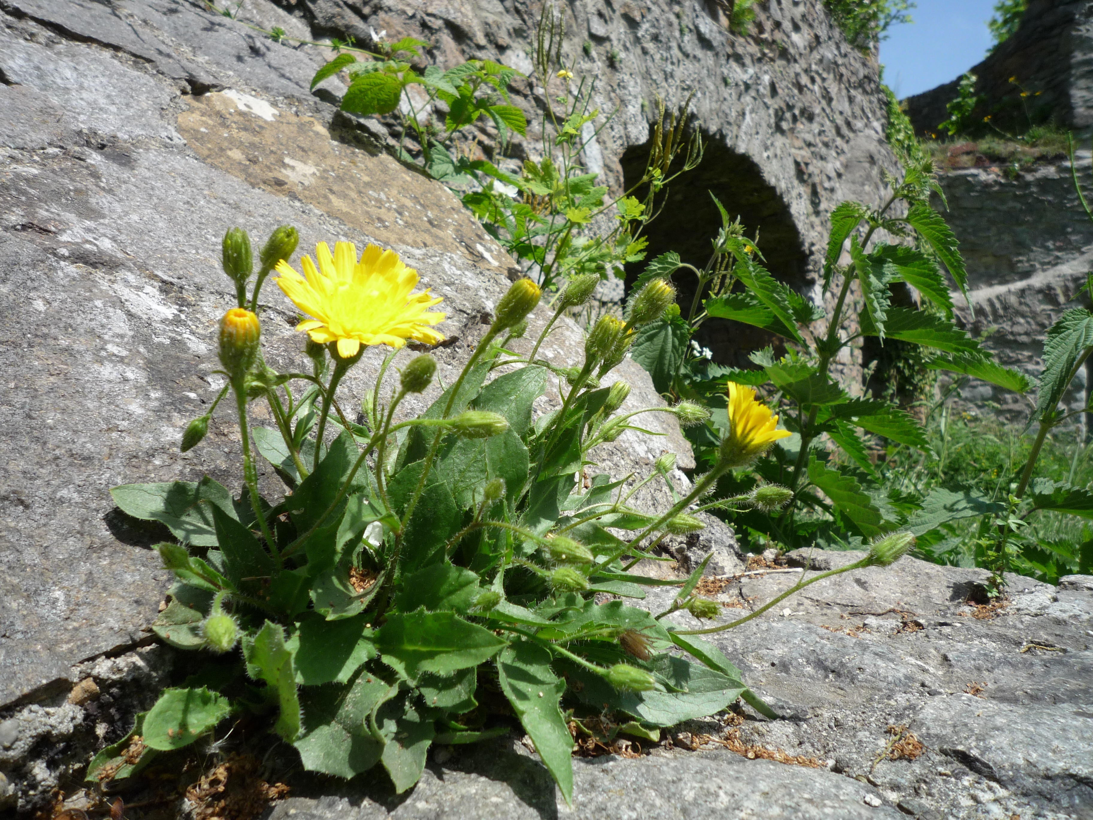 Niedriges Habichtskraut in der Festung Hohentwiel (Herzogsburg)